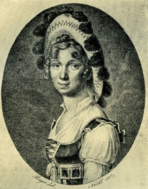 Brunetti Therese, herečka